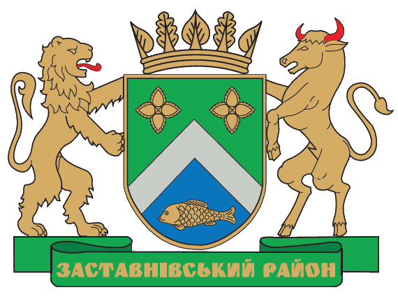 Герб Заставнівського району